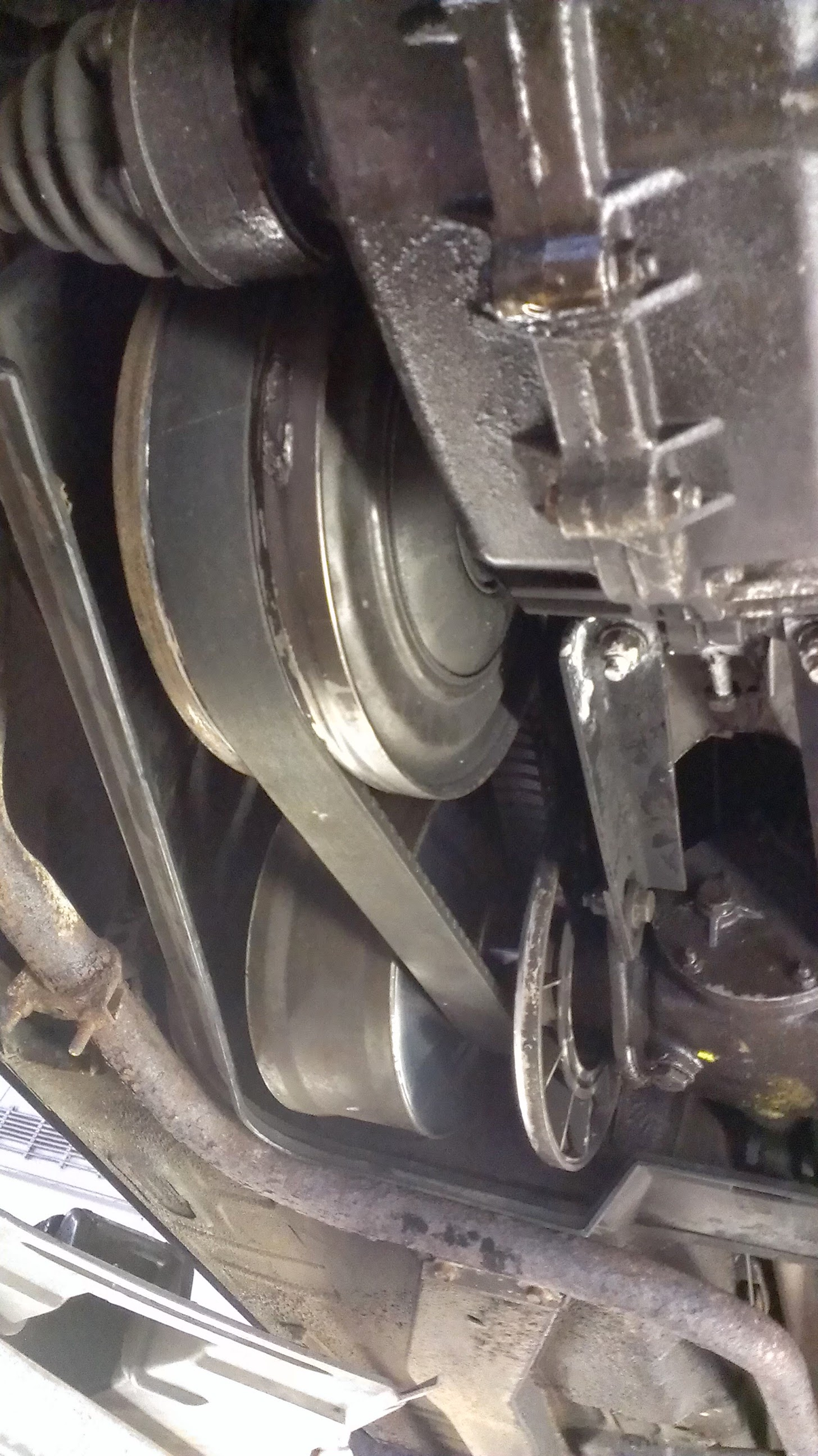 De enkelvoudige variomatic van een DAF 46